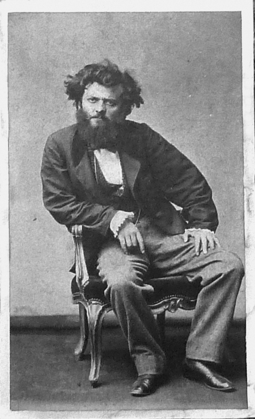 Photo-carte de visite autoportrait de Pierre Petit, vers 1870. Collection particulière S.C.